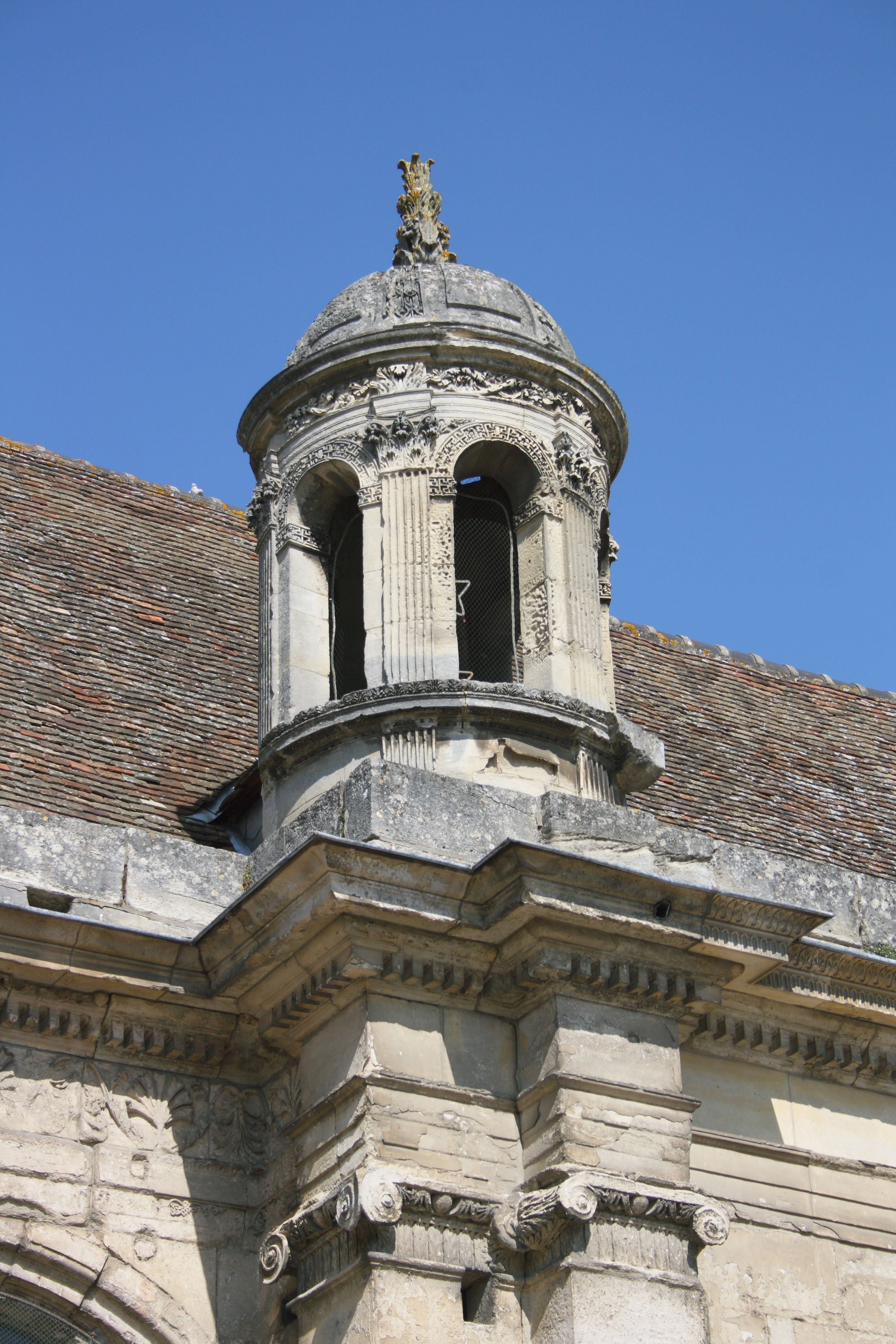 Renaissancefassade der Kirche Notre-Dame-de-la-Nativité in Magny-en-Vexin